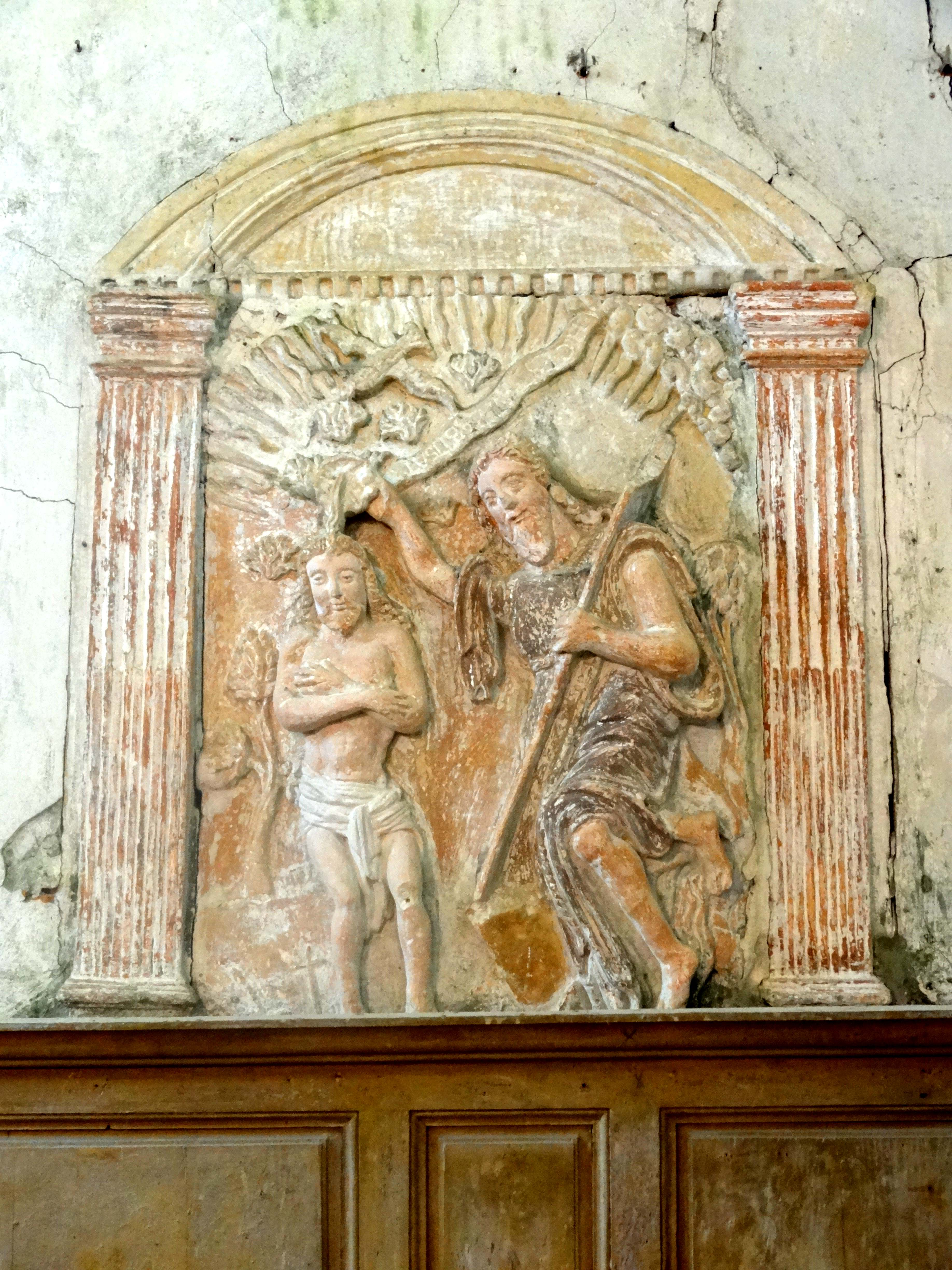 Mobilier de l'église - voir titre.